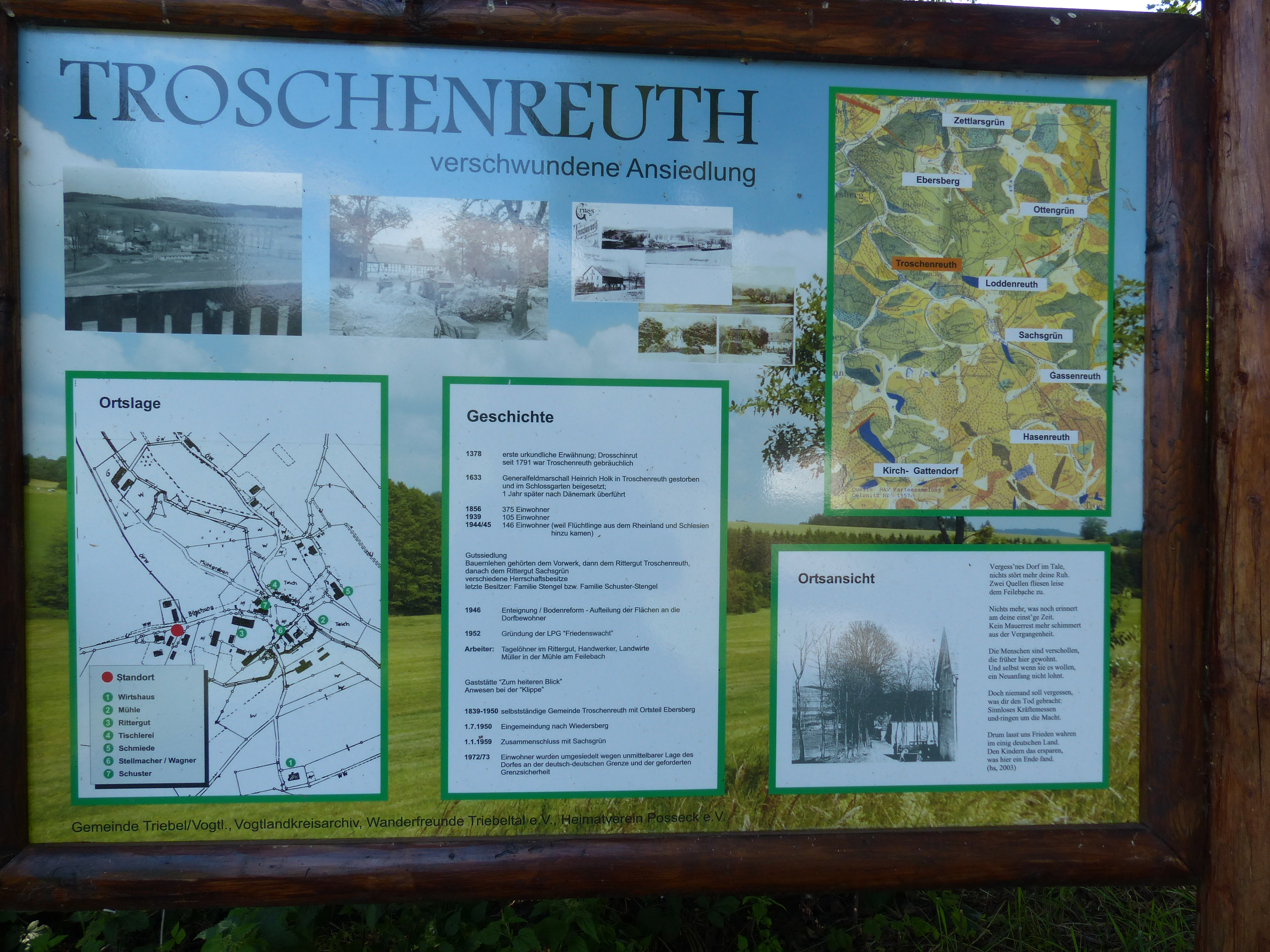 Ansichten zur Wüstung Troschenreuth